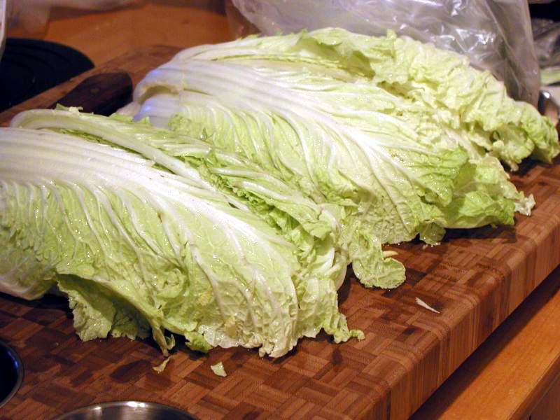 배추, chinese cabbages